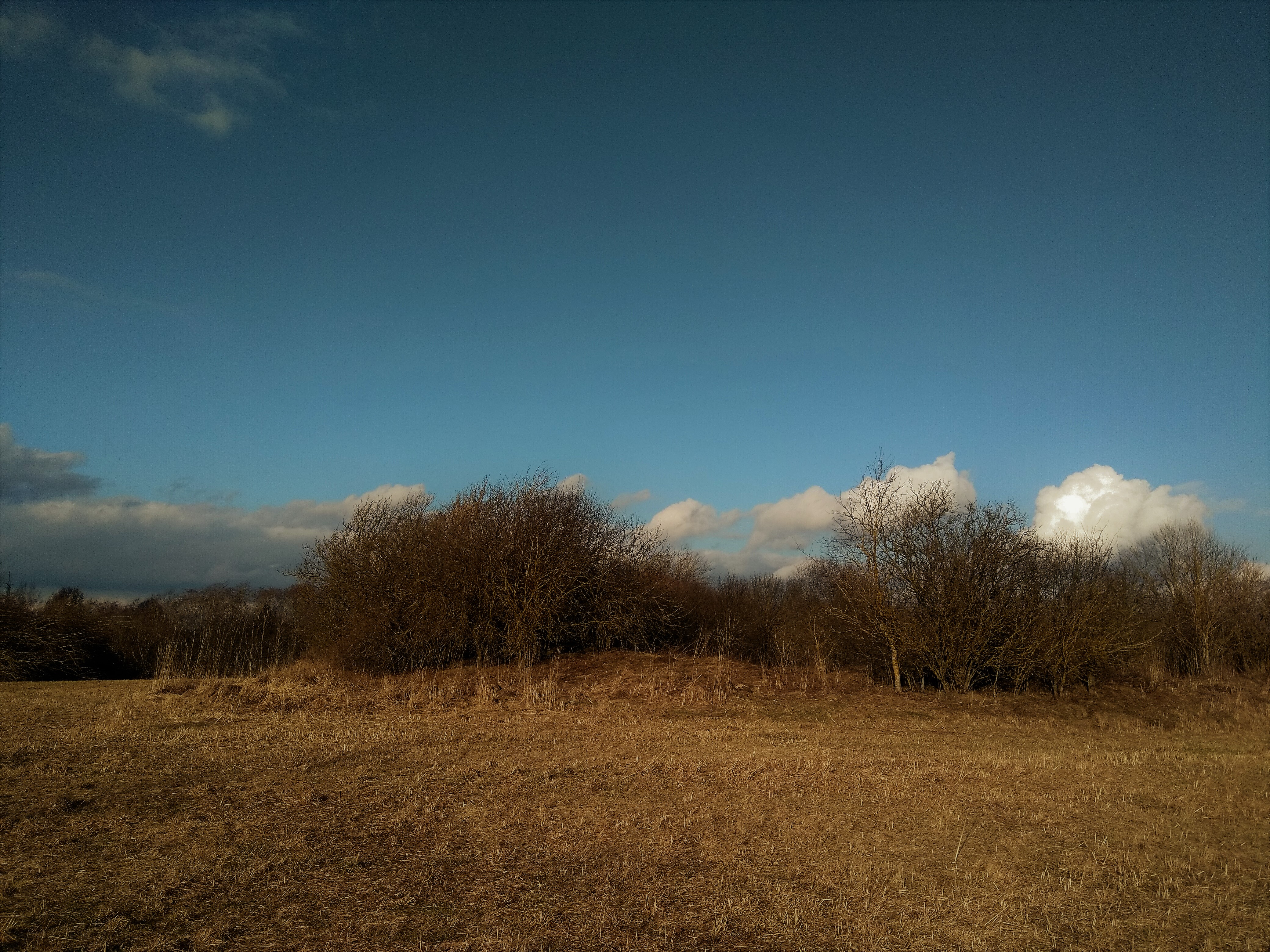 Vaade edelast linnuse maa-ala lääne-edelanurgale.